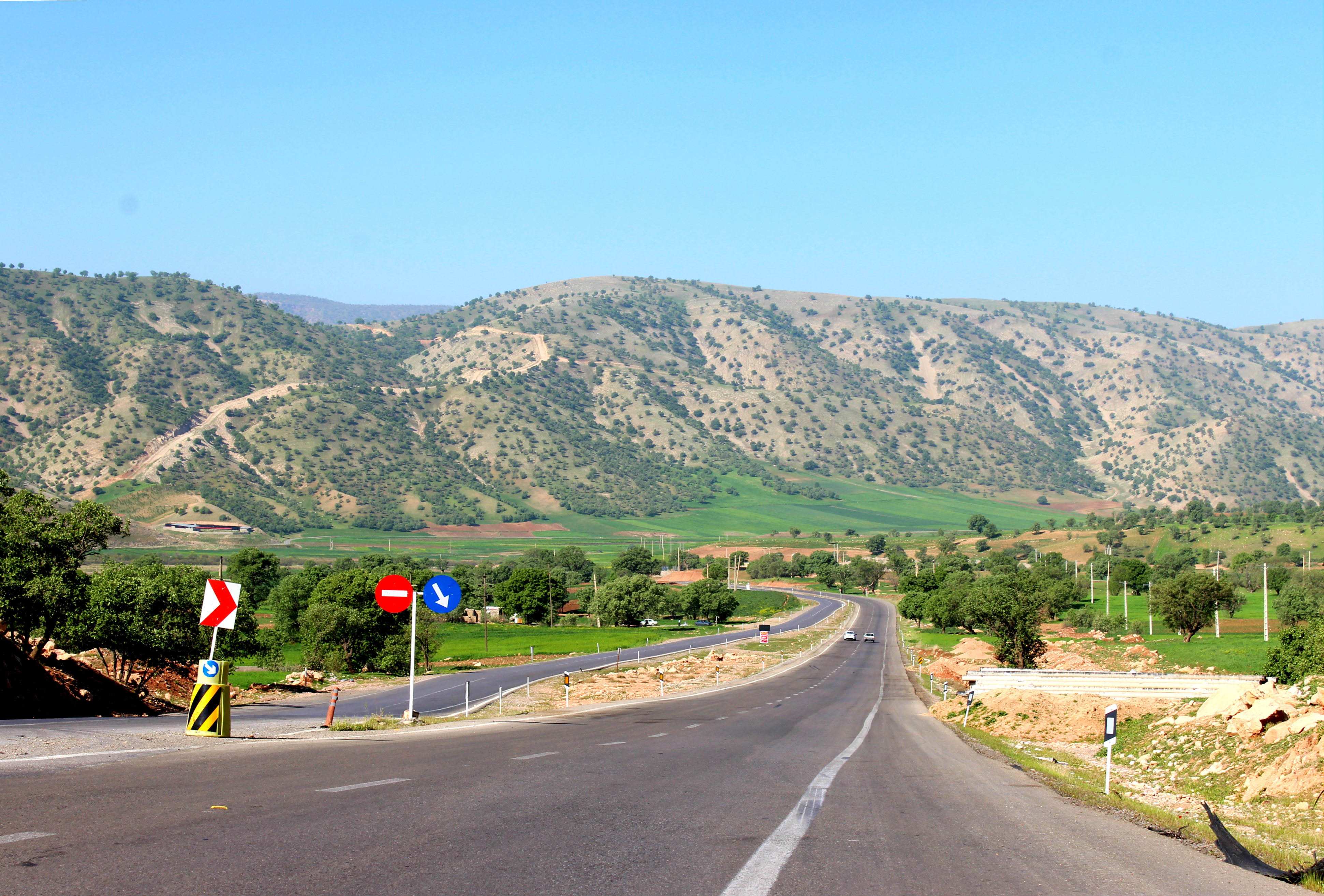 جاده خرم آباد - کوهدشت